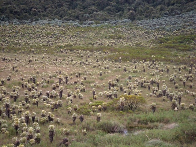 Frailejon es abundante en la zona